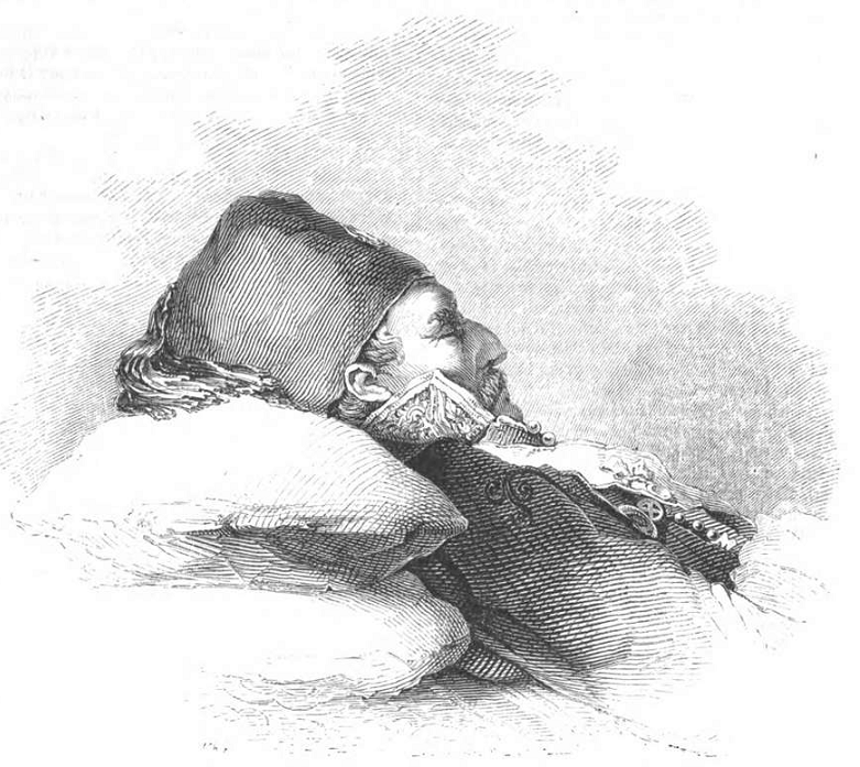 Theodor Kolokotroni auf dem Paradebette